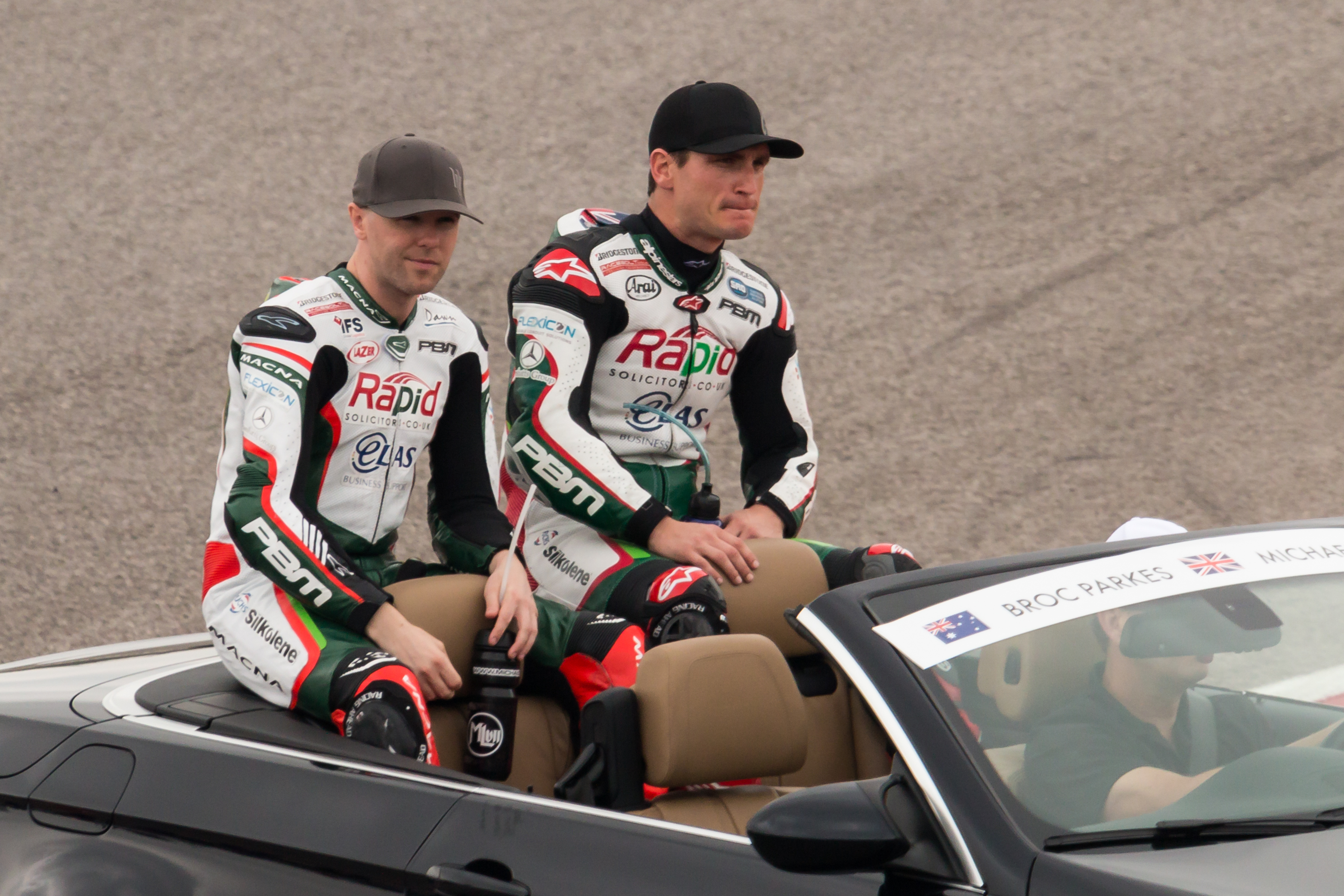 Parkes and Laverty